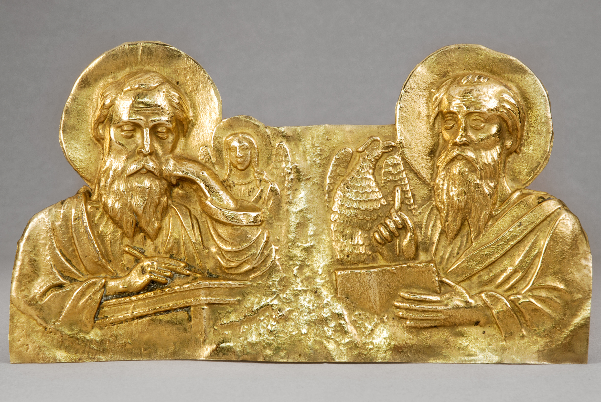 Reliure d'Evangile, 19ème siècle. Collection du Musée arménien de France